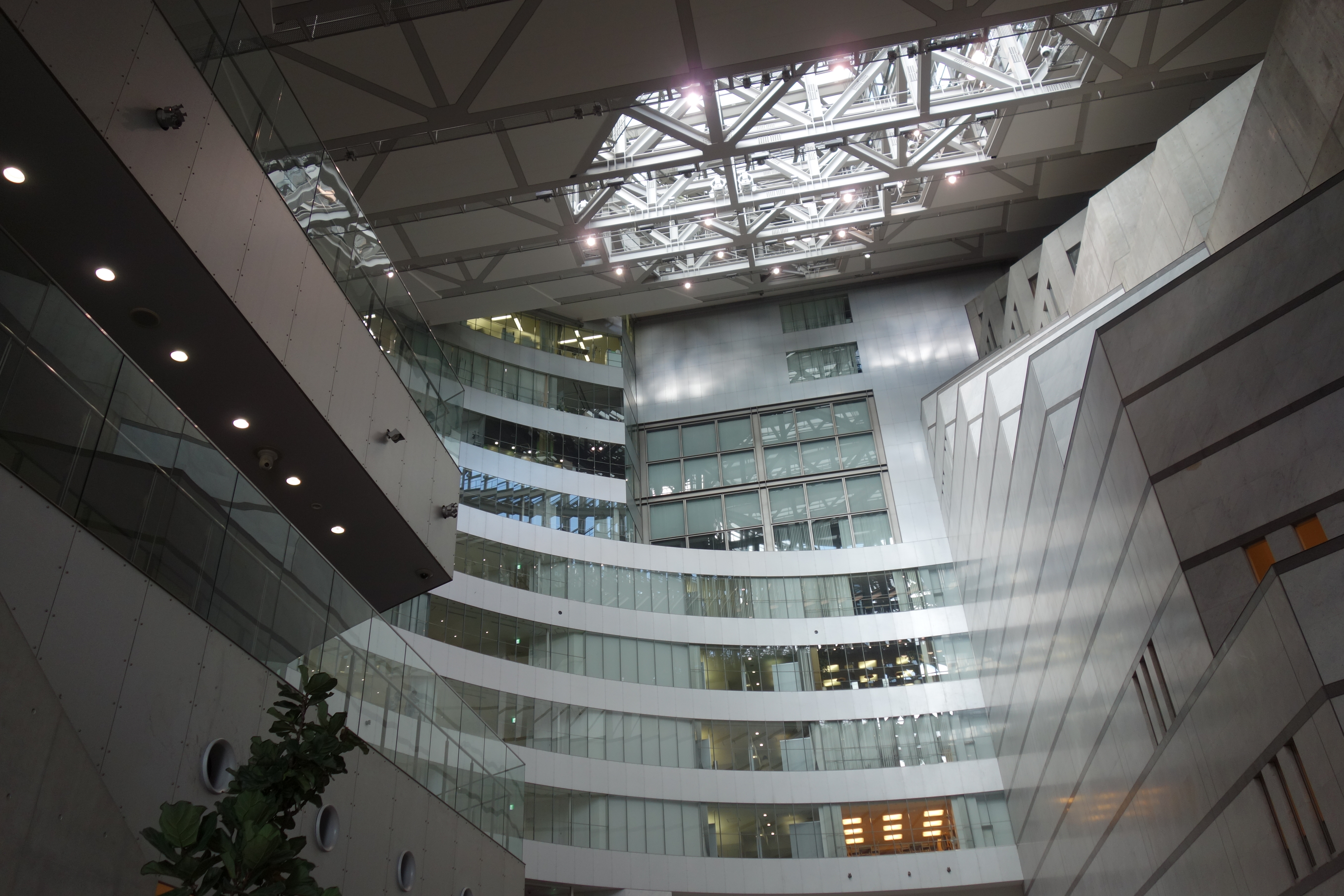 アクロス福岡・1Fアトリウム